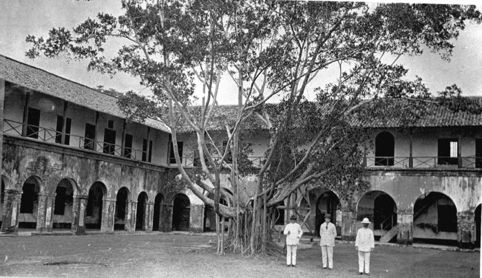 Foto. De binnenplaats van de voormalige Nederlandse kazerne op het eiland Onrust voor de kust van Batavia